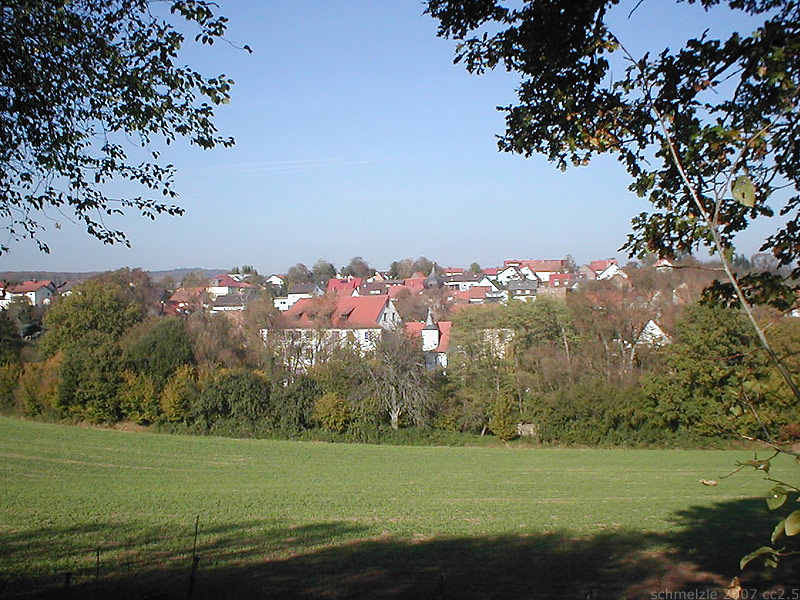 Blick von Süden auf das Schloss in Mosbach-Lohrbach, Baden-Württemberg, Deutschland. Über den Baumwipfeln der Bäume des Schlossgeländes zu erkennen das Hauptgebäude (links), daneben ein Treppenturm, dahinter der runde Turm der Zehntscheune (alte kath. Kirche), rechts davon der Torturm (Burgfried) von 1413.